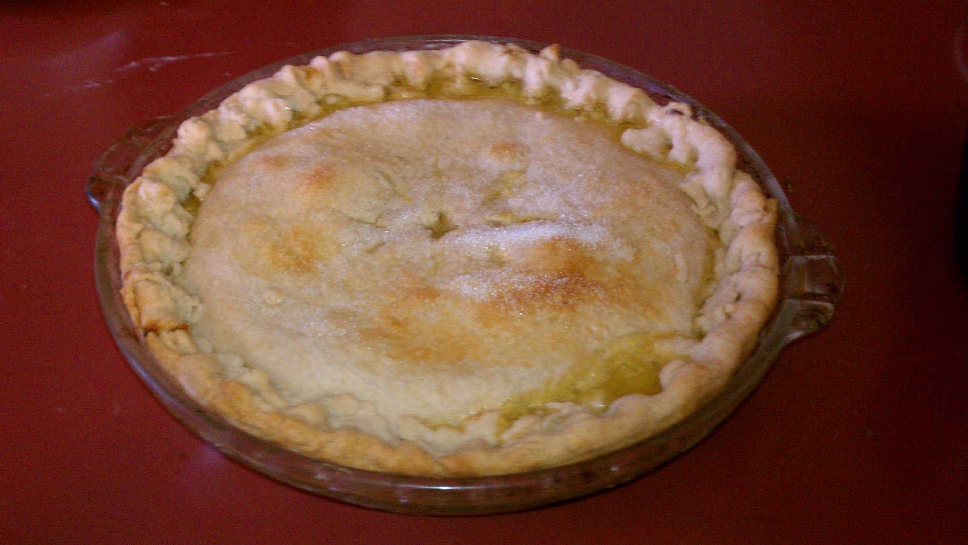 Shaker lemon pie